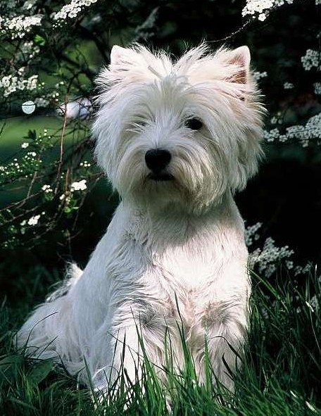 BASSICA Montezuma, a young West Highland White Terrier female